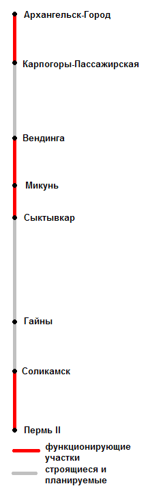 Схема строящейся железнодорожной магистрали «Белкомур» (Архангельск-Сыктывкар-Пермь)